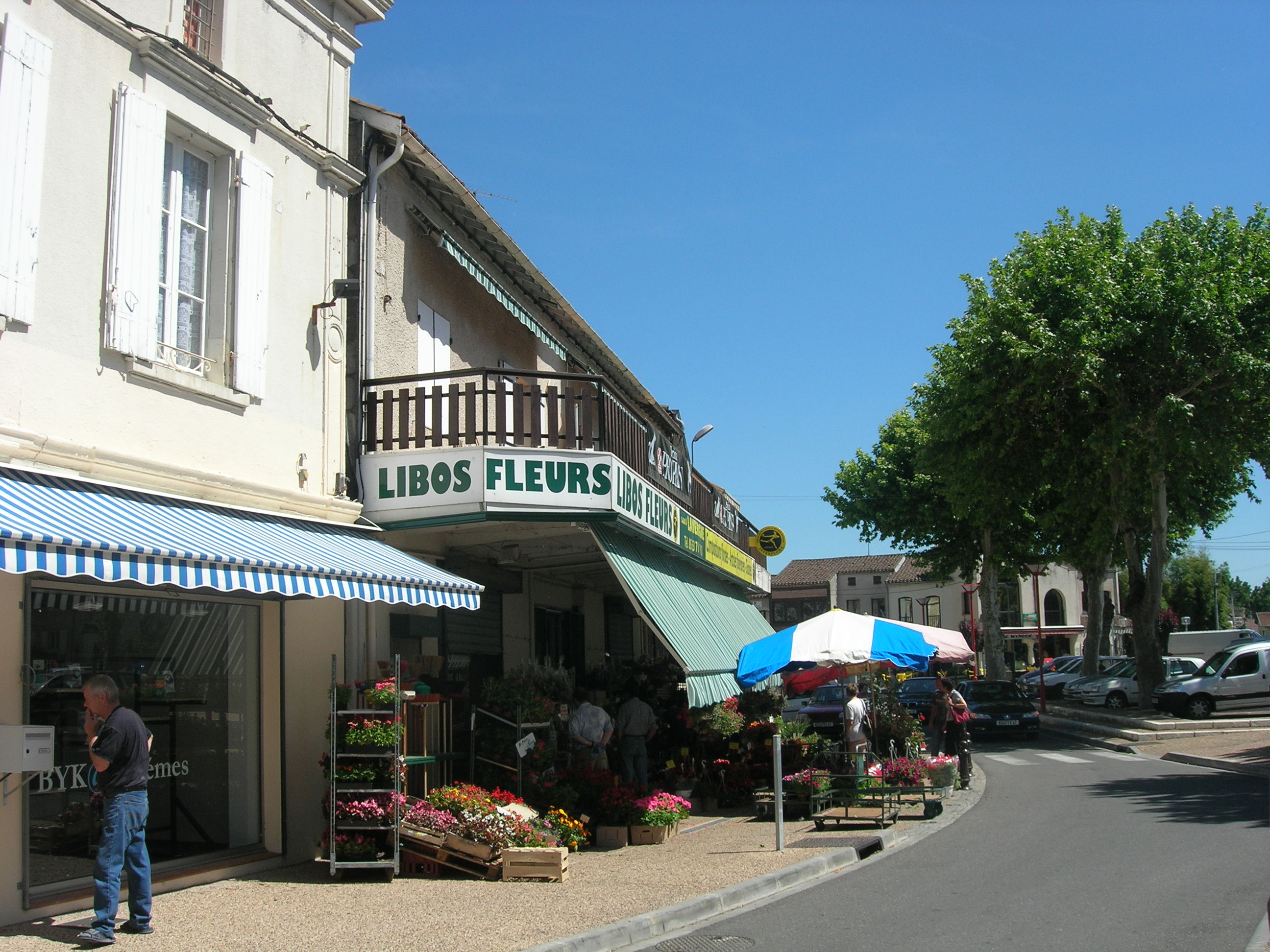 une rue de Libos (Lot-et-Garonne, Aquitaine, France).